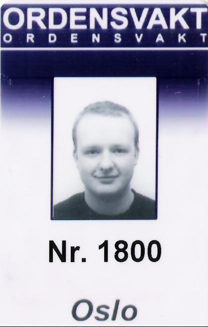 Dette er et ordensvaktbevis jeg har scannet inn. This is an identification card used by norwegian doormen.